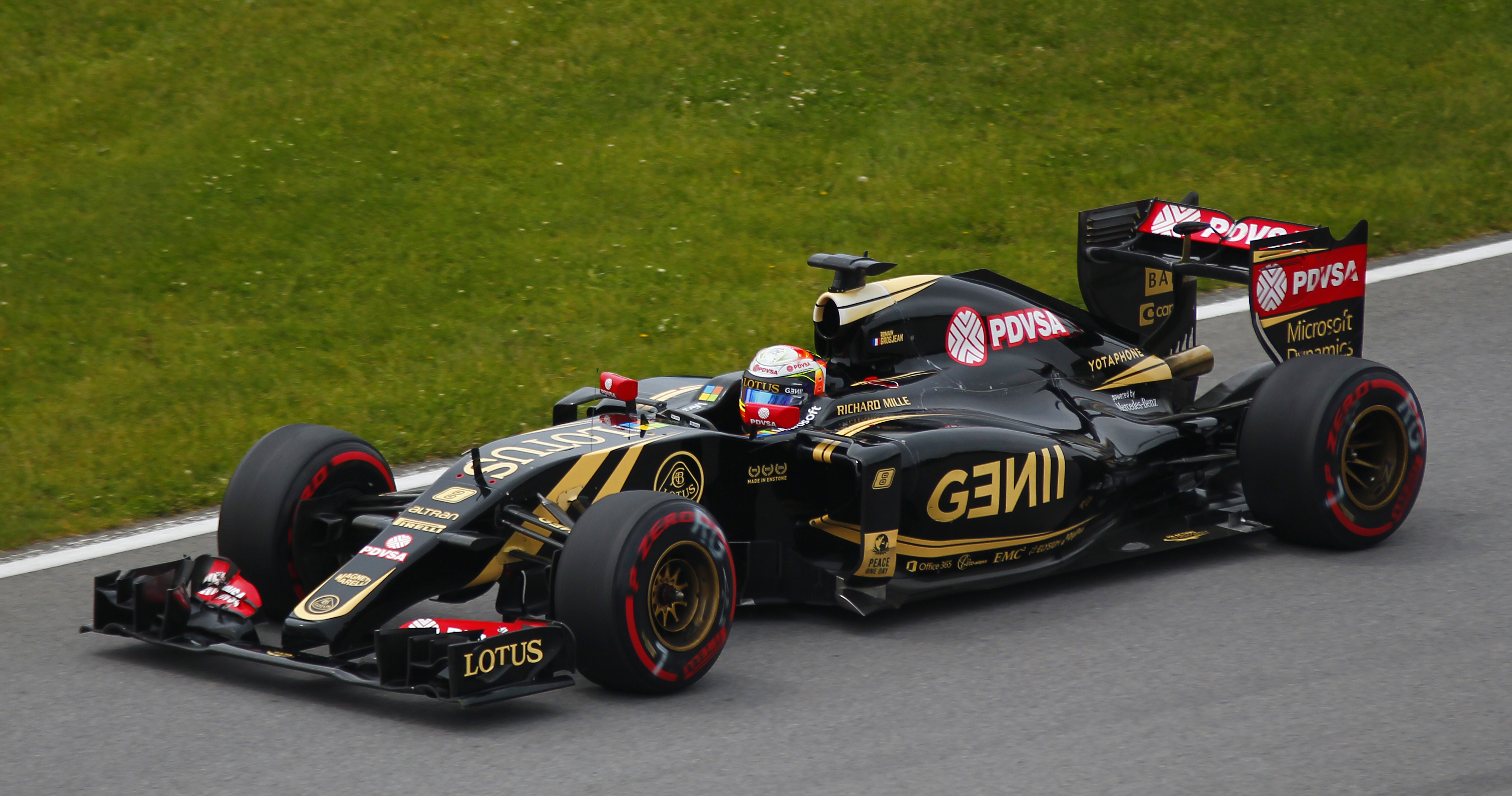 Romain Grosjean - Lotus F1 Team - Grand Prix du Canada - Circuit Gilles-Villeneuve - 7 juin 2015 (Photo Paul-Émile Poulin-Jacques)